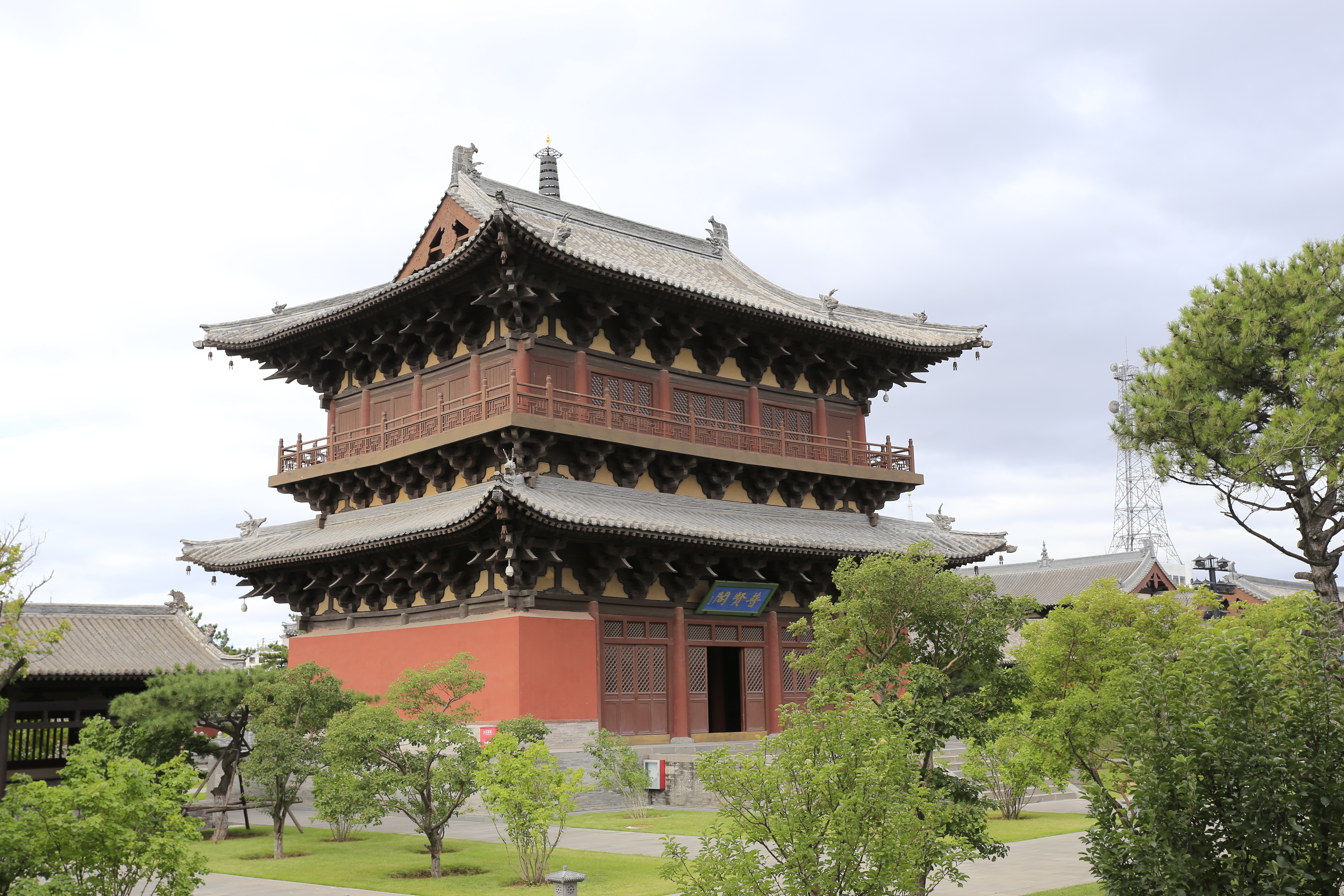 大同华严寺—— 普贤阁